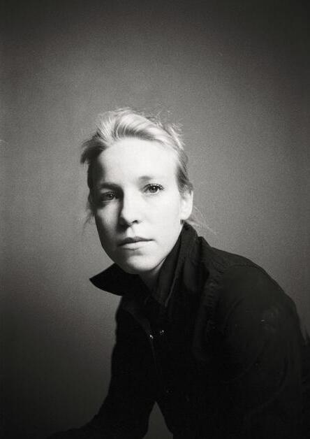 Российская актриса Мария Шалаева.